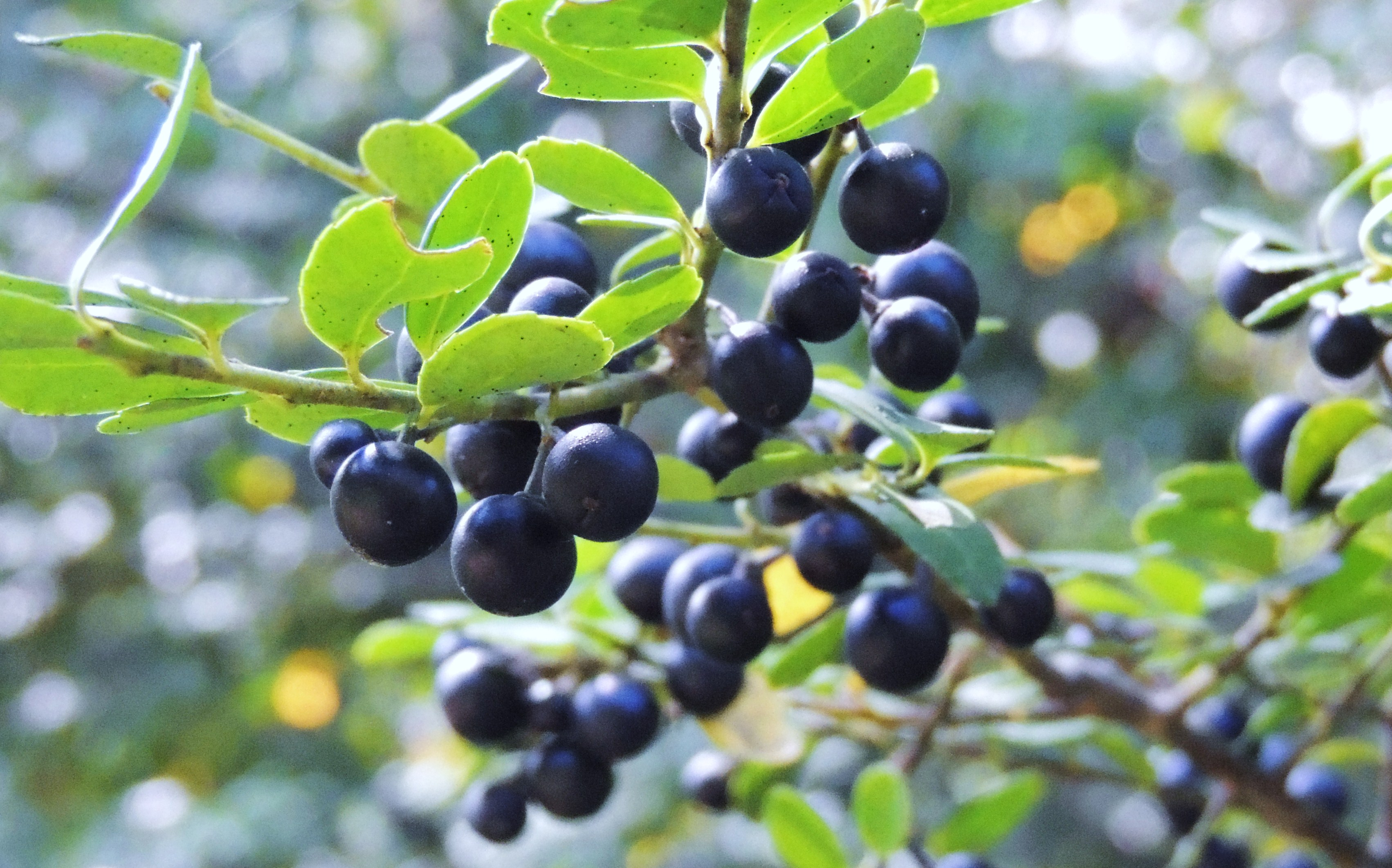 みやま公園 イヌツゲ